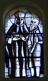 eines der 32 Kirchenfenster in der Pfarrkirche Liesing (Wien 23) gestaltet von Martin Häusle. Zeigt Virgilius von Salzburg selbst fotografiert Erstellungssatum: März 2007